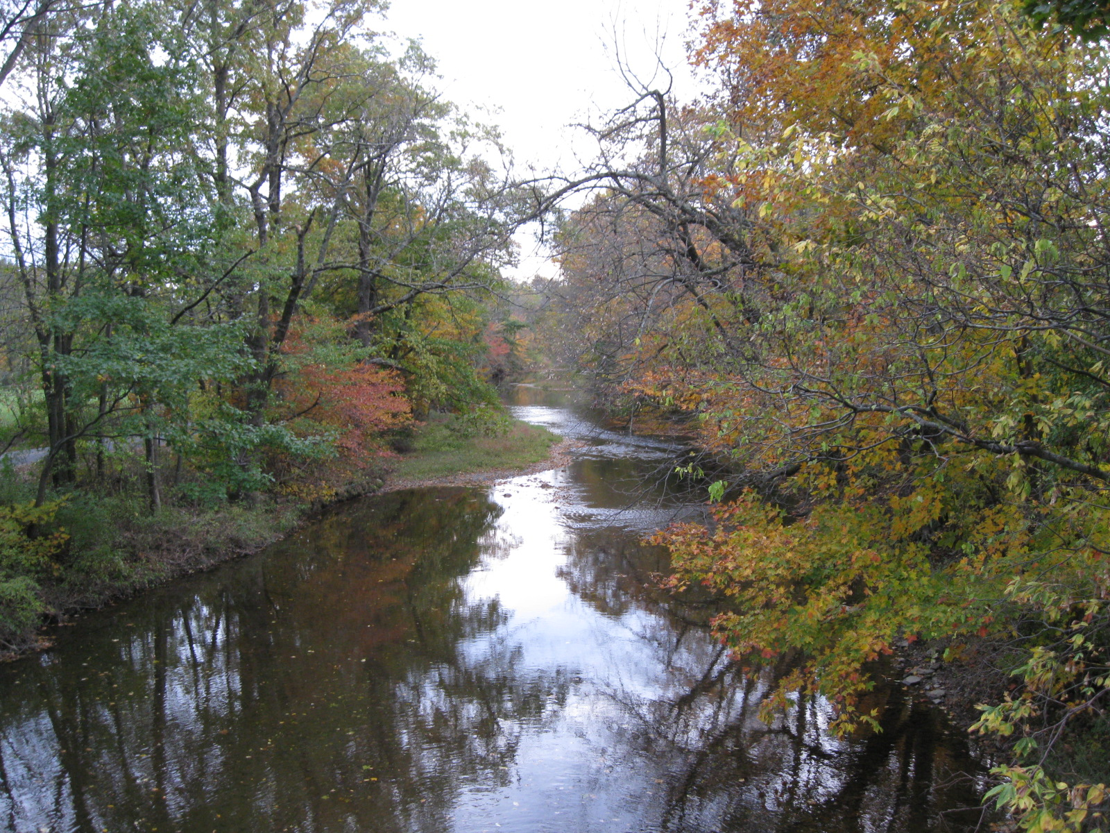 Trexler, Pennsylvania